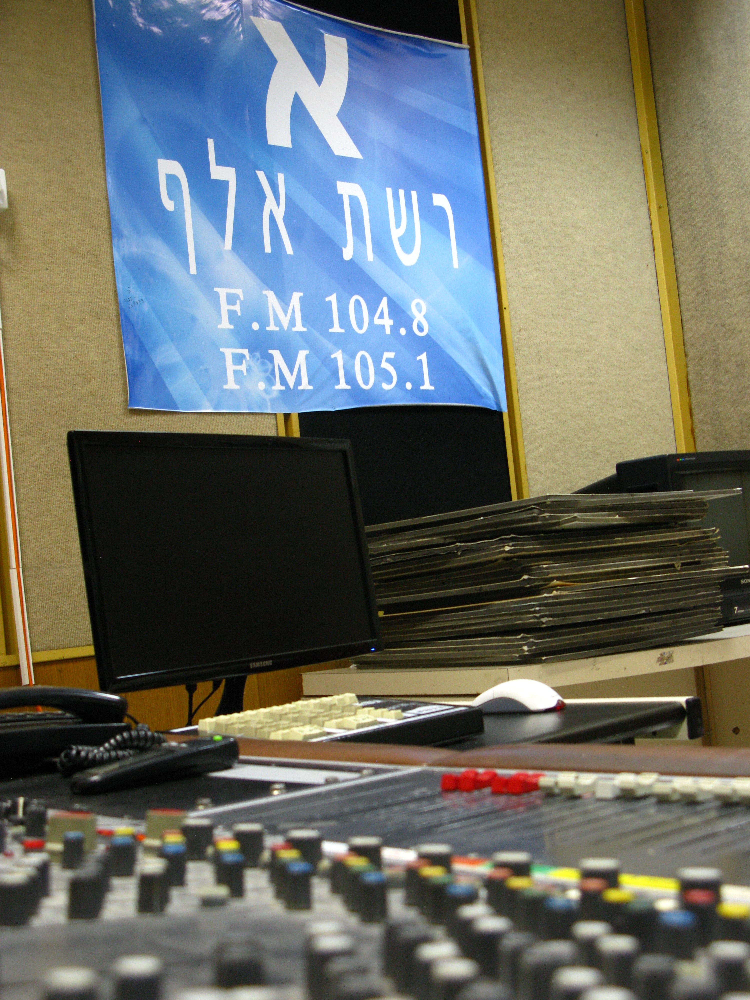 בניין קול ישראל ברחוב הלני המלכה בירושלים, משמש את תחנת הרדיו "קול ישראל" מאז ימי הרדיו המנדטורי ב-1939, ולסגירת רשות השידור.